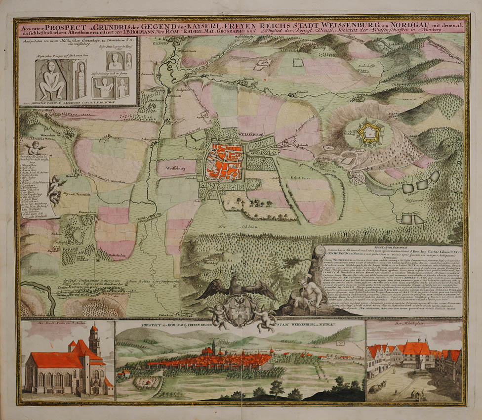 Accurater Prospect u. Grundris der Gegend der Kayserl. Freyen Reichs Stadt Weissenburg am Nordgau, Kupferstich bei Johann Baptist Homann Erben, um 1725